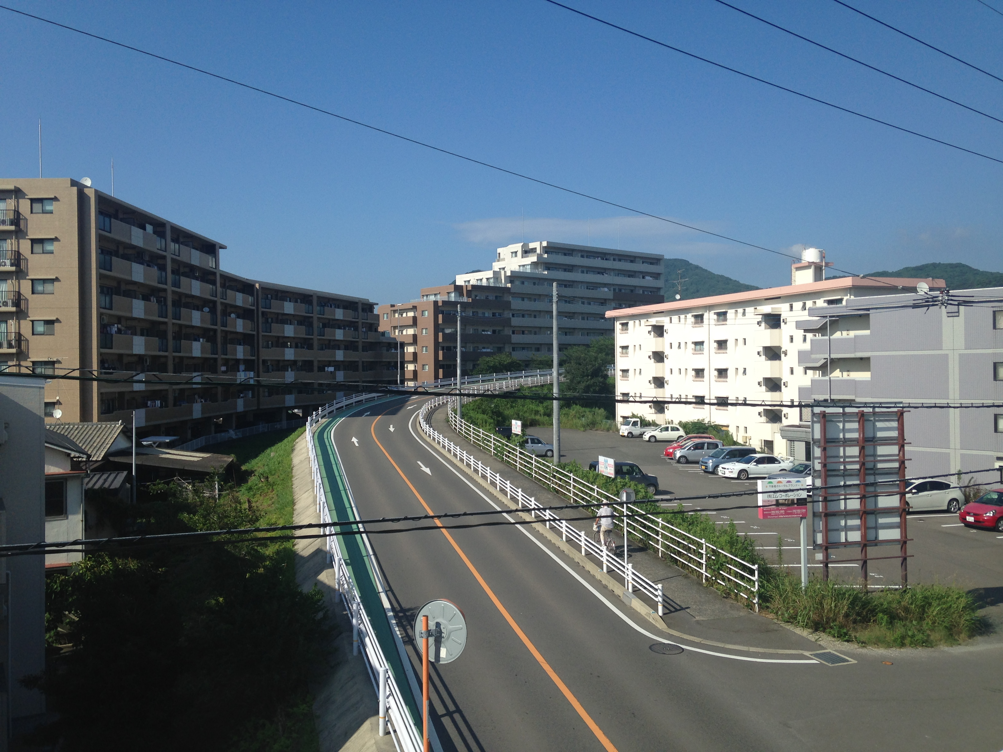 鎧坂歩道橋より望む福岡県道504号